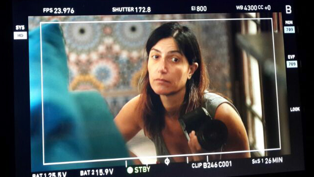 הצלמת ורד אדיר